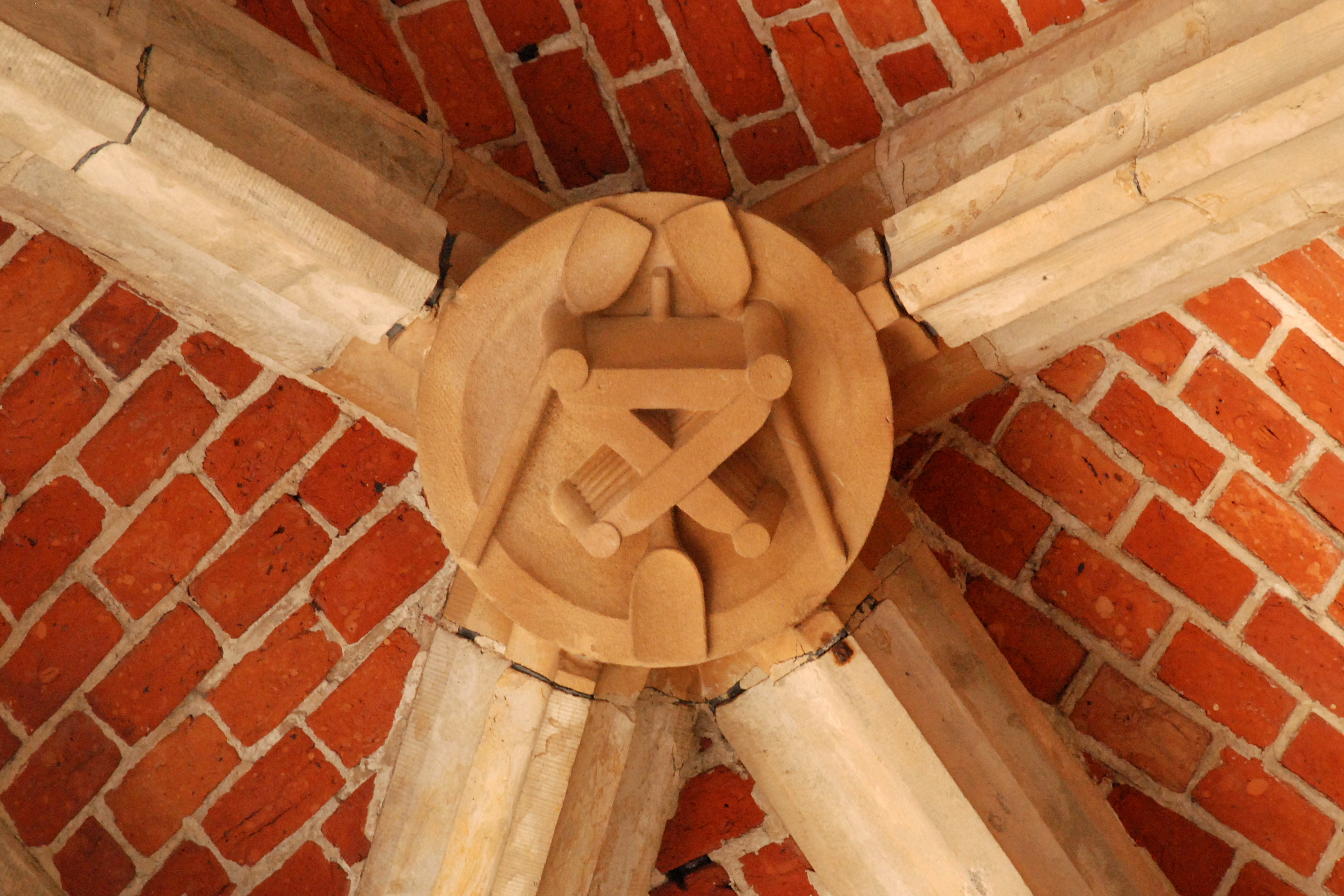 Belgique - Bruxelles - Grand-Place - Hôtel de Ville - Maison de l'Estrapade (Scupstoel)